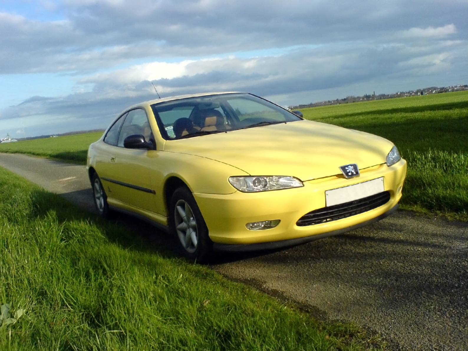 Peugeot 406 Coupé Jaune Louxor de 03/1999 (phase 1) 2.0l 135ch